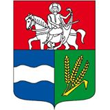 Blason voulangis